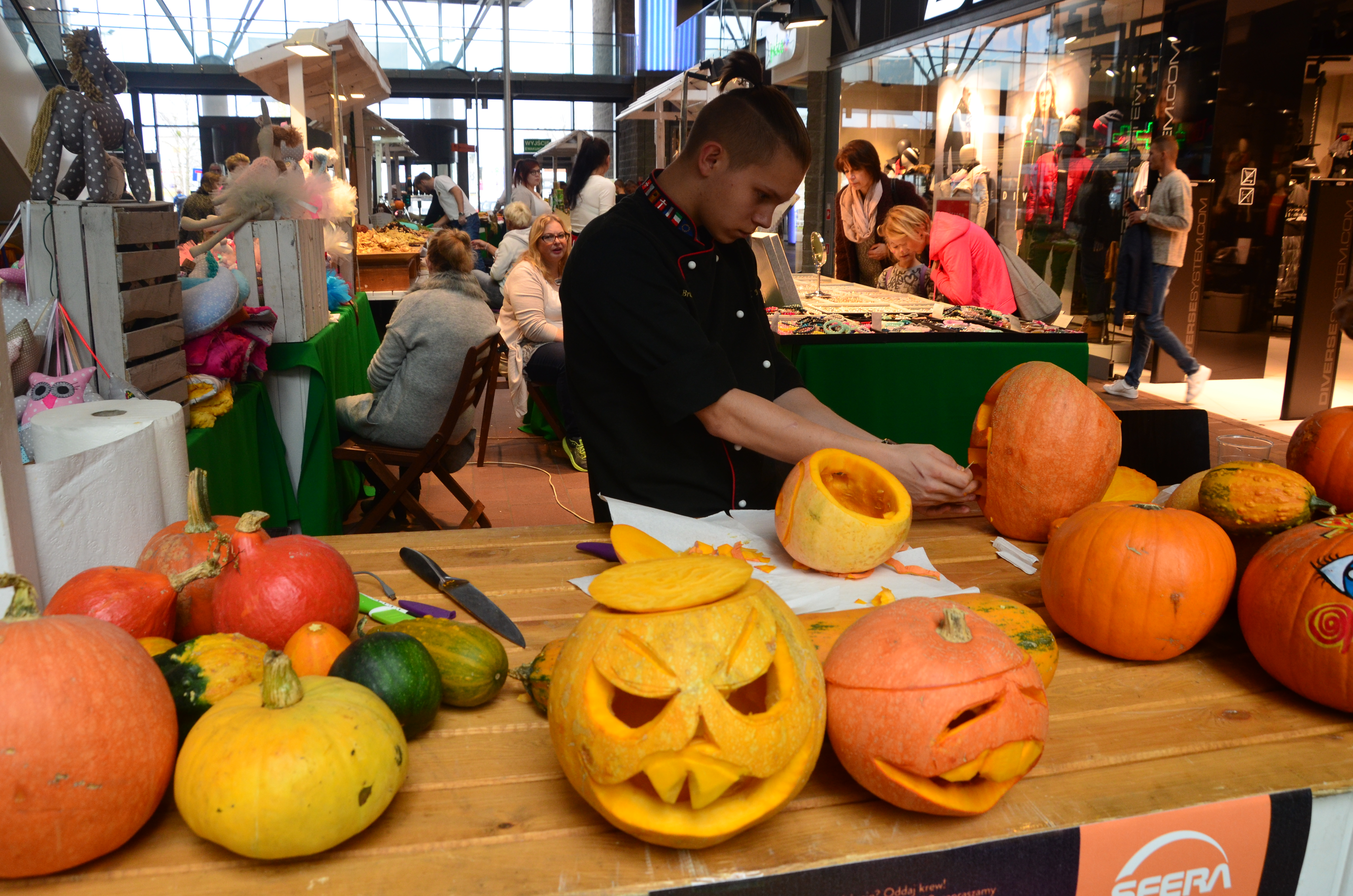 Halloween-Fest 2016, Beskiden